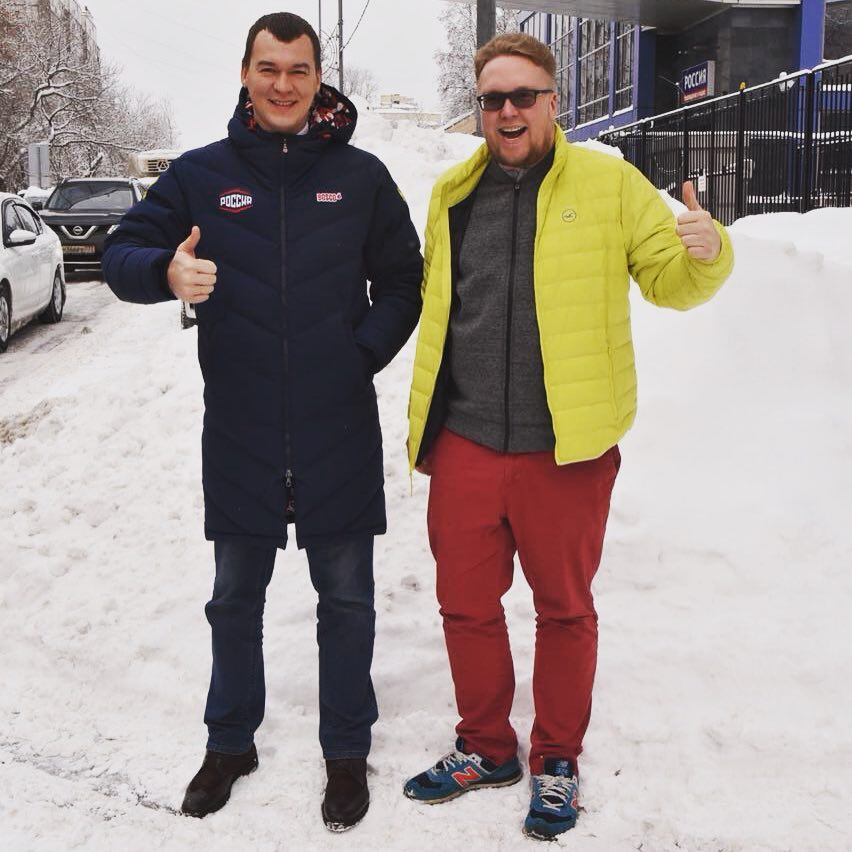 Михаил Дегтярёв с Сергеем Стиллавиным.